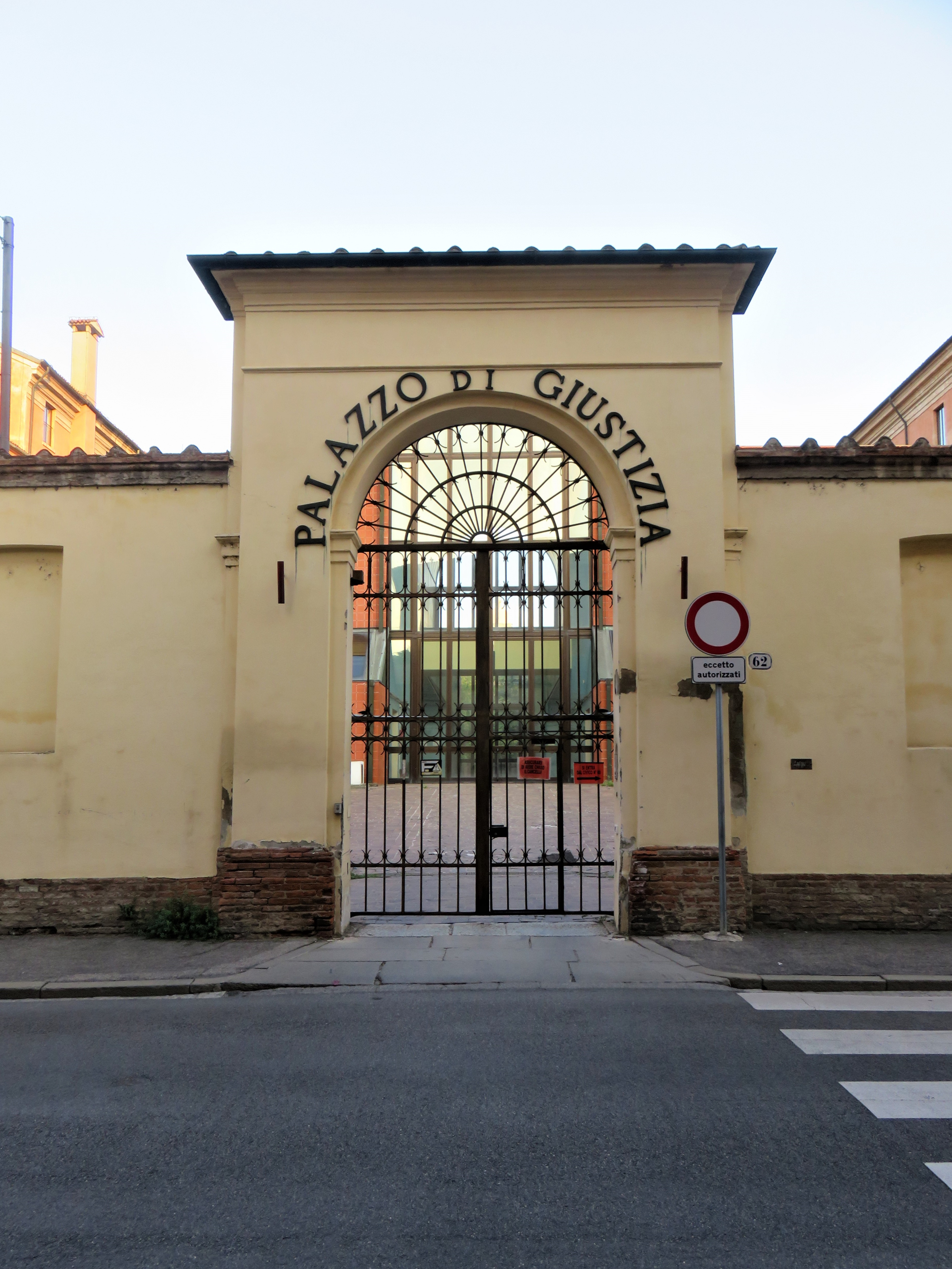 Ingresso del Tribunale di Ferrara in via Borgoleoni 62